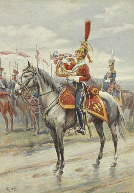 Trompette du 3e régiment de chevau-légers lanciers de la Garde impériale. Cette unité, formé en juillet 1812, subit de très lourdes pertes à Slonim (18 octobre), où le général Konopka, colonel du régiment, et 246 hommes sont faits prisonniers. Le corps est définitivement dissous en mars 1813 et ses éléments intégrés au 1er régiment de lanciers polonais de la Garde impériale.